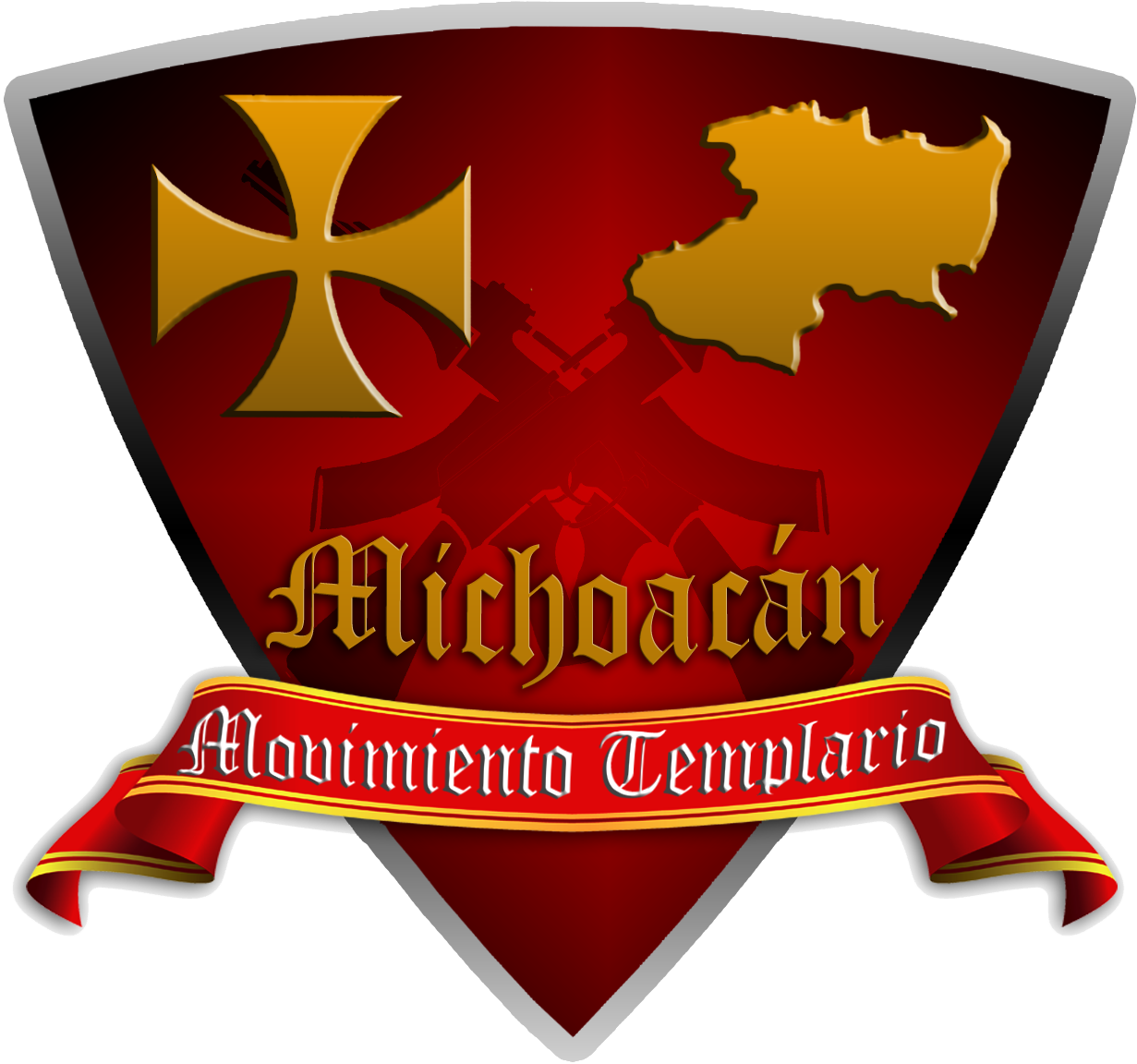 uno de los logos de los caballeros templarios